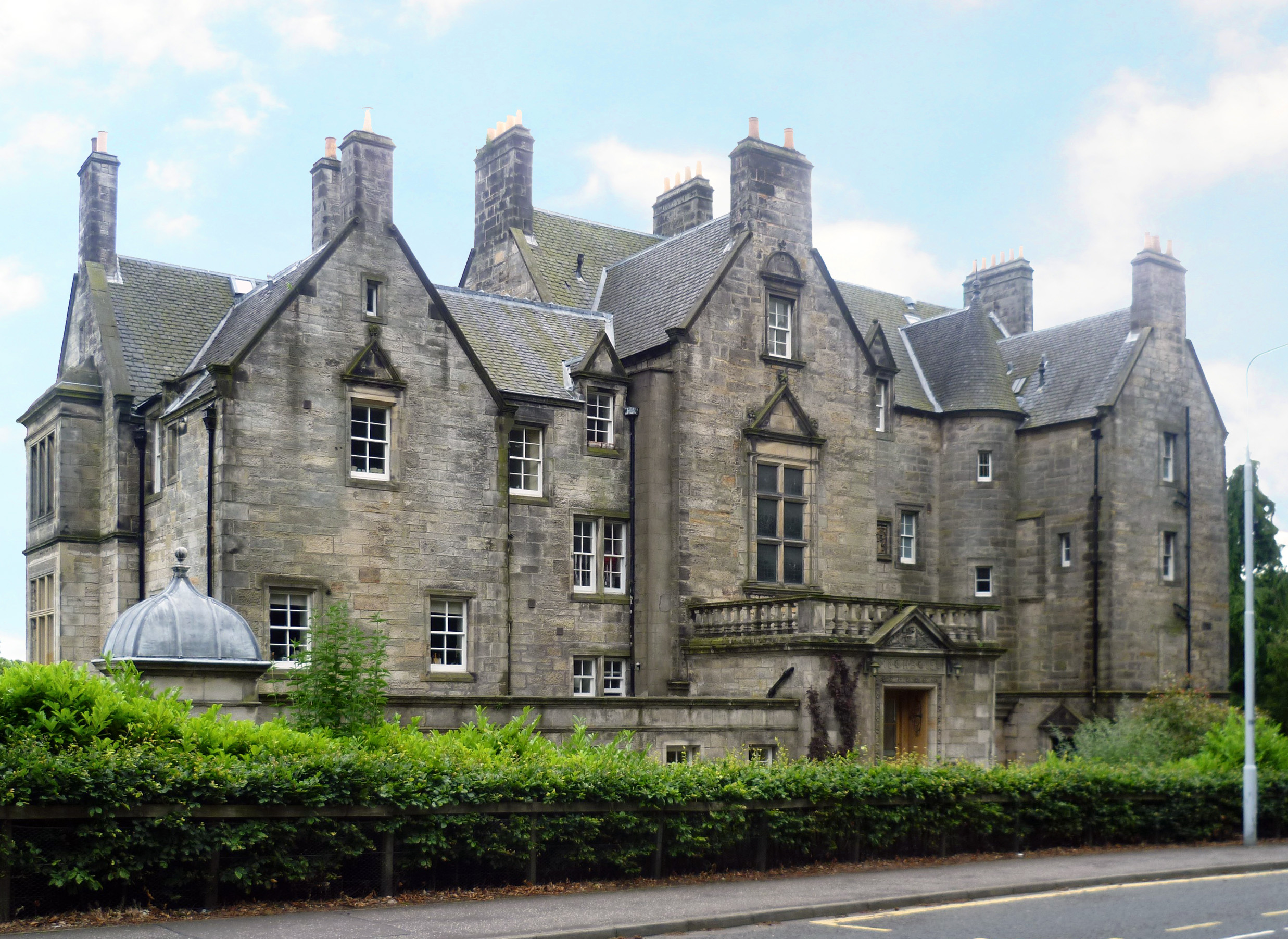 Das schottische Pitreavie Castle südlich von Dunfermline